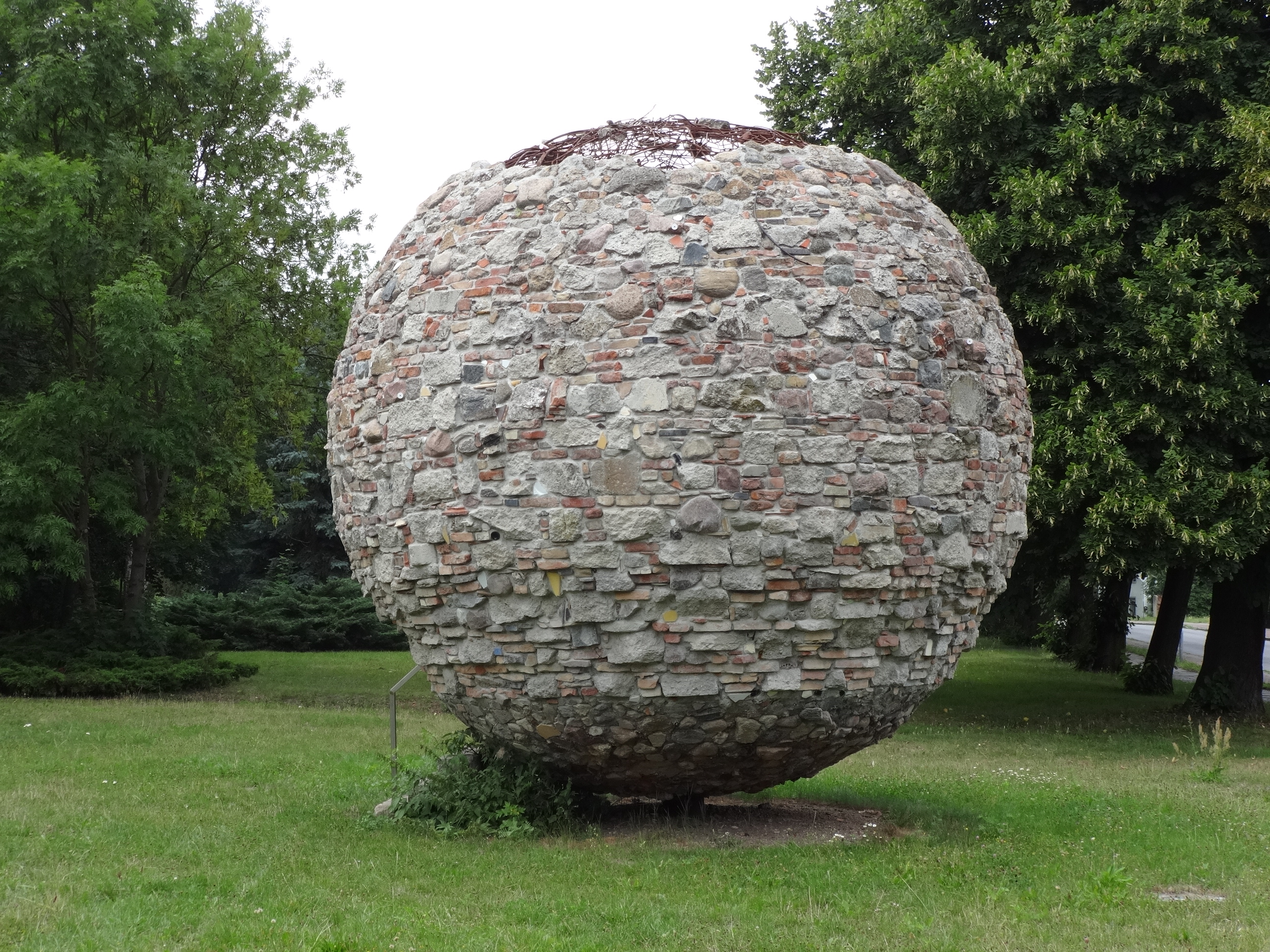 Projekt des kanadisch-schweizerischen Installationskünstlers Ernest Daetwyler in Pasewalk. Er schuf auf 30 Tonnen Trümmern des Zweiten Weltkrieges eine 5,5 Meter hohe begehbare Kugel in Pasewalk, Mecklenburg-Vorpommern.